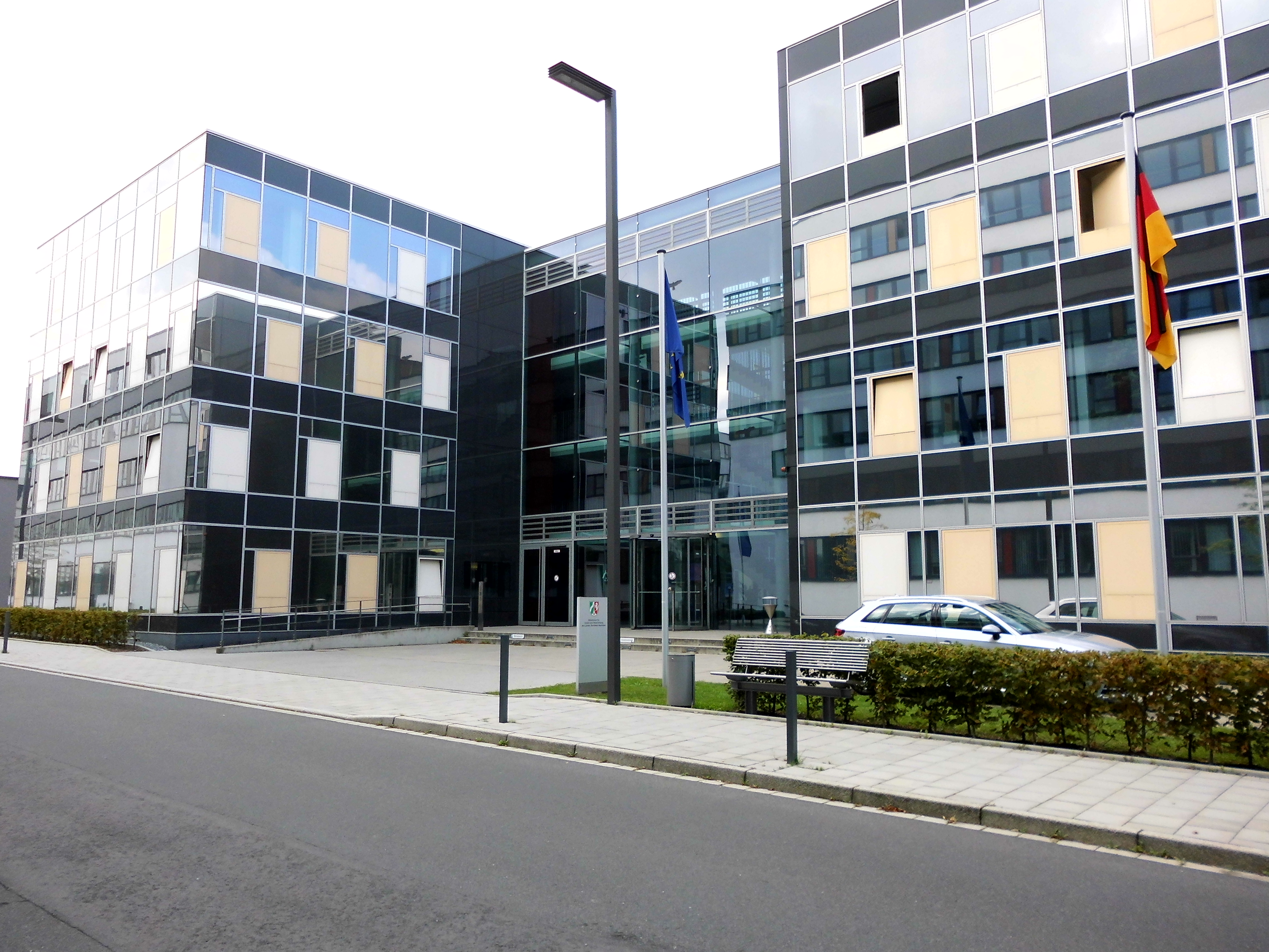 Ministerium für Schule und Weiterbildung des Landes Nordrhein-Westfalen